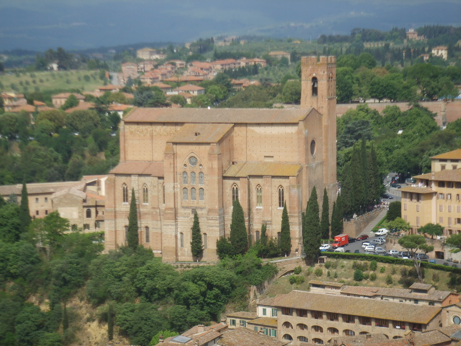 San domenico, view